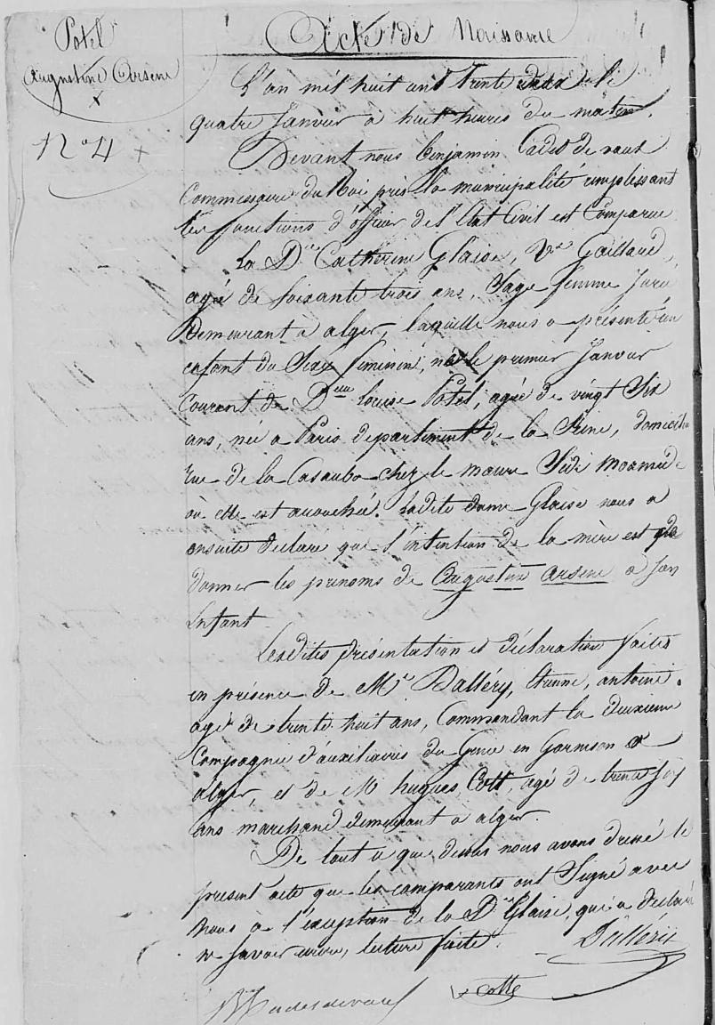 Premier acte de naissance européen dressé à Alger en janvier 1832. Augustine Arsène Potel